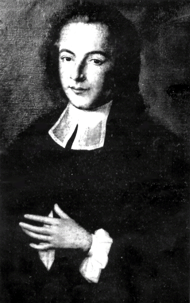 Tessedik Sámuel (1742-1820)